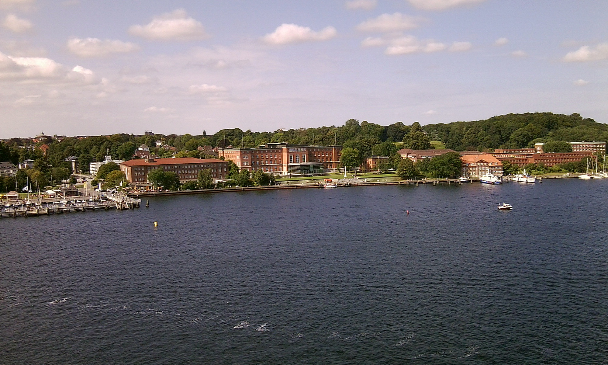 Kiel / Sitz der Landesregierung und Ministerien